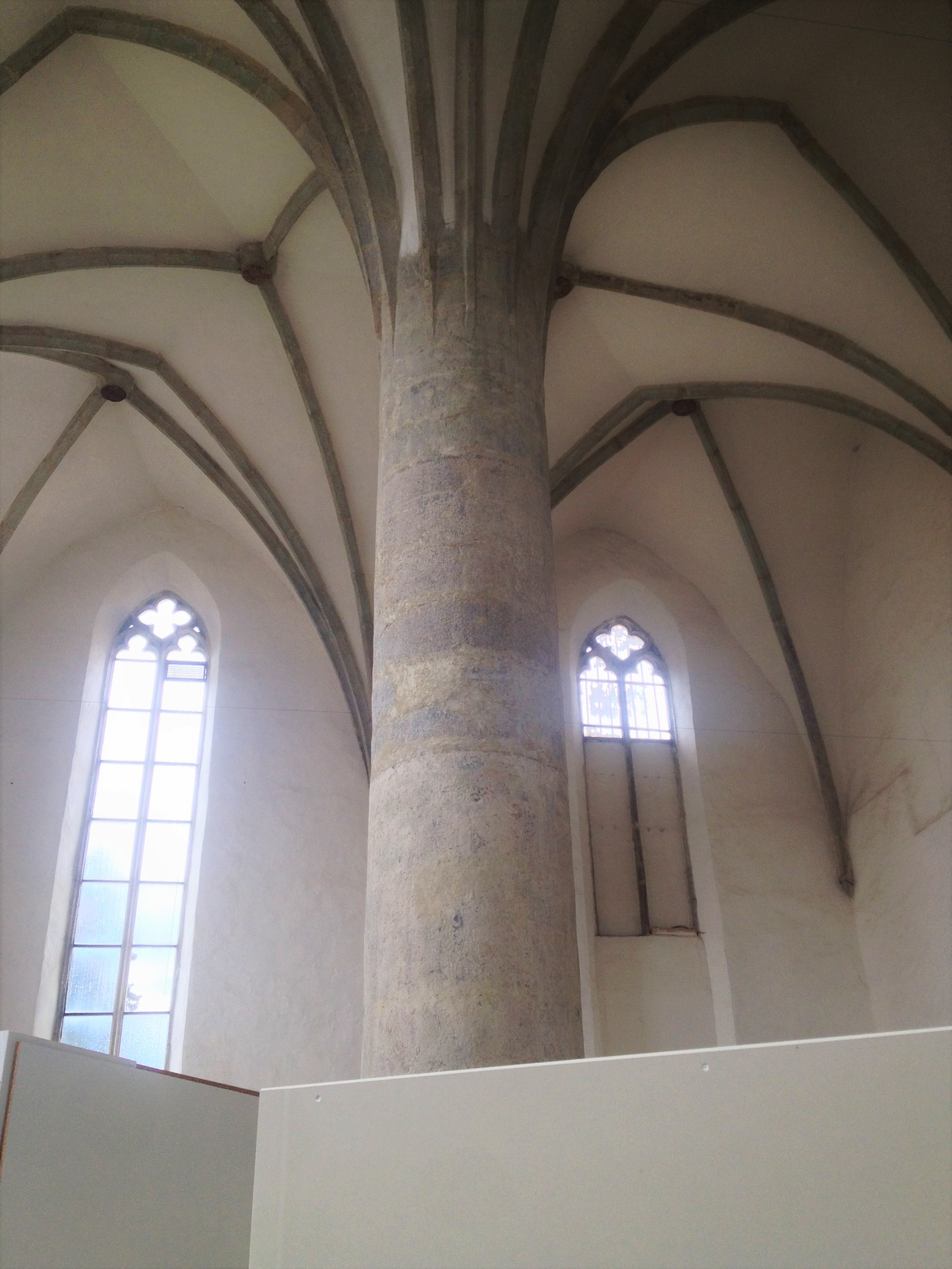 centralni sloup